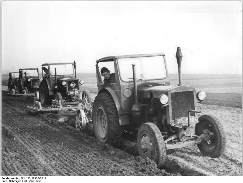 Vorbereitung der Kartoffellege ZB-Schmiljun-26.3.1953 Frühjahrsbestellung 1953 - modernste Maschinen, modernste Arbeitsmethoden. Tausende von Genossenschaftsbauern, Traktoristen, Agronomen und Landmaschinenarbeitern haben sich zum Aufbau der Grundlagen des Sozialismus auf dem Lande, zur Umgestaltung der Landwirtschaft in die sozialistische Großflächenwirtschaft vereinigt. Bis auf einige kleine Flächen hat die MTS Leimbach Kreis Querfurt mit einer Hektarfläche von 7 700 die Frühjahrsaussaat abgeschlossen und ist jetzt beim Ziehen der Saatfurche für die Kartoffeln. Der Aufruf des Zentralkomitees der Sozialistischen Einheitspartei Deutschlands zur strengen Sparsamkeit veranlasste die MTS Leimbach, mit der MTS Straach einen Freundschaftsvertrag abzuschließen, der das Ziel hat, die Maschinen bei Bedarf in den Grenzgebieten beider MTS-Bereiche auszutauschen. So werden nich nur beträchtliche Treibstoffmengen, sondern auch wertvolle Arbeitsstunden eingespart. UBz: Sozialisstische Großflächenwirtschaft bedingt den Brigadeeinsatz, den die MTS Leimbach weitgehend entwickelt hat. Auf den Feldern der Produktionsgenossenschaft "Otto Peter" im Kreis Querfurt ziehen vier Maschinen im Brigadeeinsatz die Frühjahrsfurche für die Karoffelaussaat.